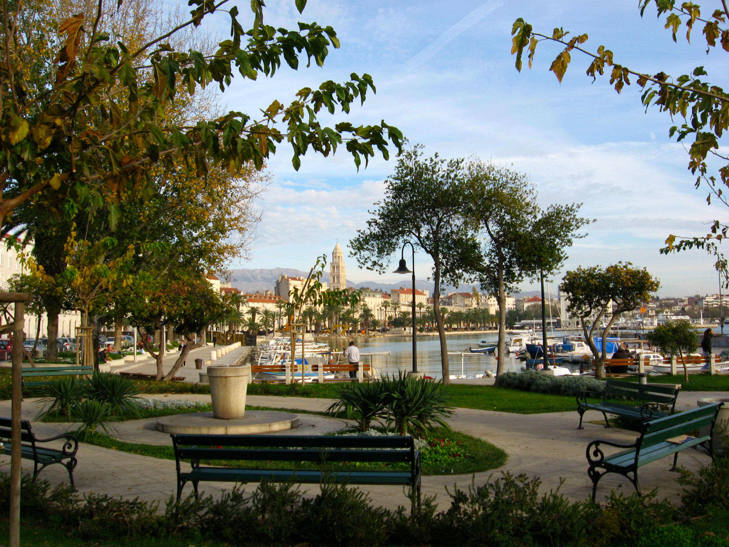 Pogled sa Matejuške